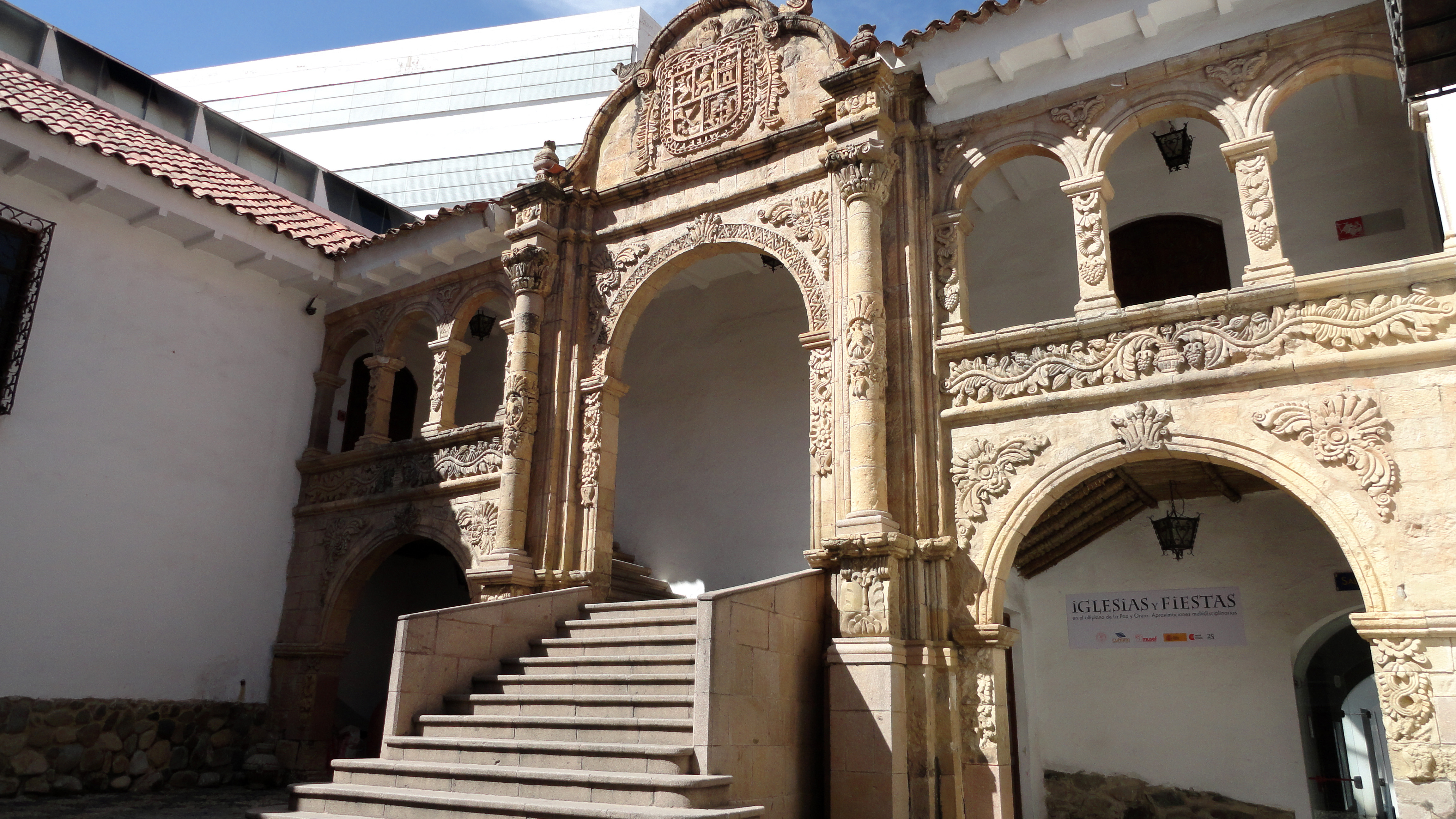 Palacio de los Marqueses de Villaverde, Museo de Etnografía y Folclore This medium shows the protected monument with the number L/00-055 in Bolivia.